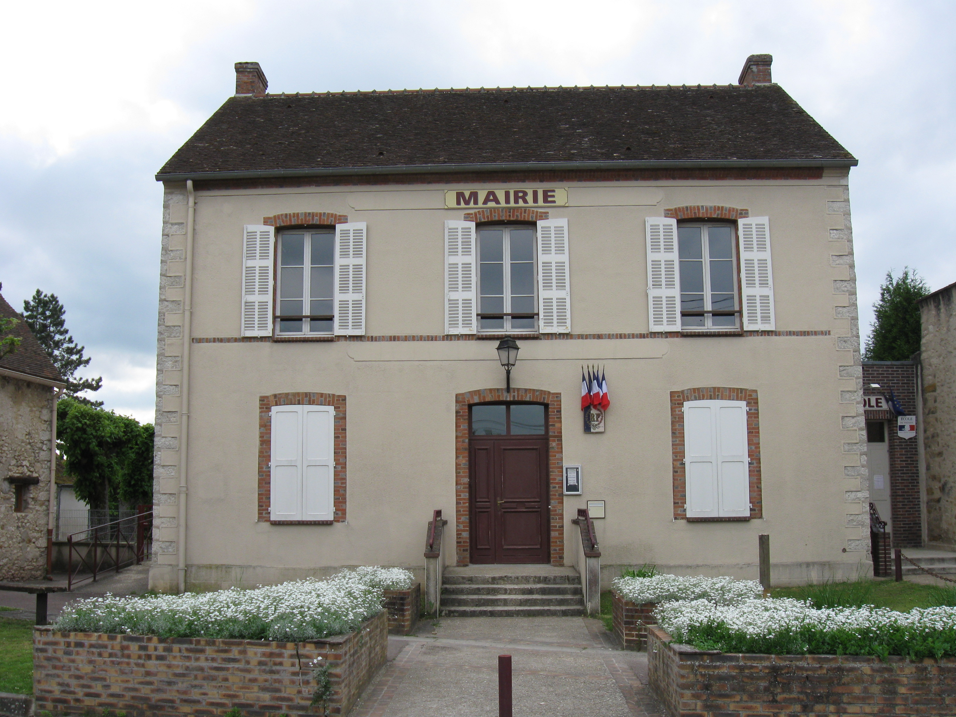 Mairie de Thénisy. (Seine-et-Marne, région Île-de-France).